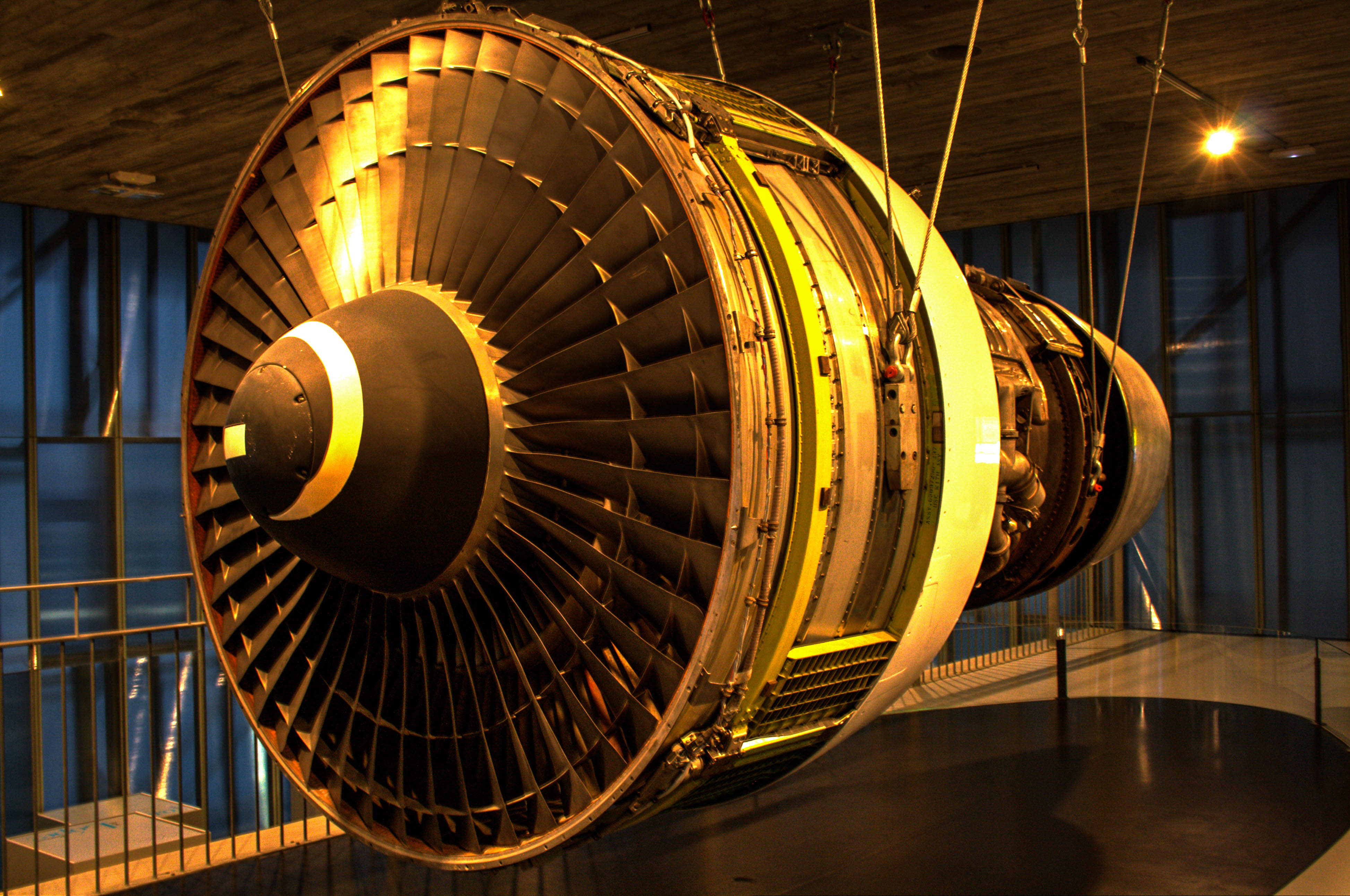 Turbofán Pratt & Whitney JT9D (Boeing 747 Lope de Vega, conocido como Jumbo), en el MUNCYT